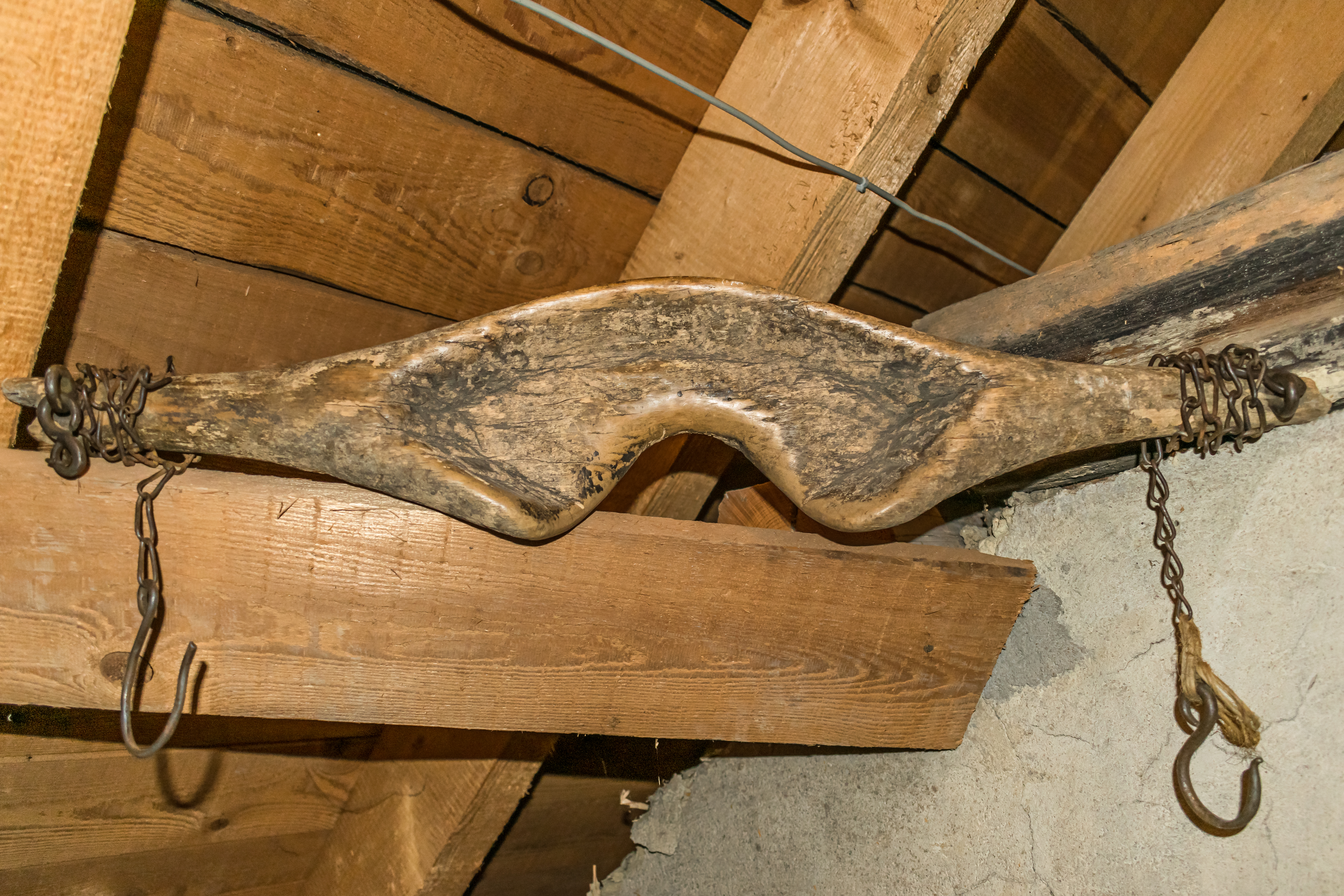 Das originale Tragjoch des Beldemer Lippert (Josef Lippert, *17. Januar 1888; † 8. Februar 1963), der in Beltheim im Hunsrück lebte und ein lokal bekannter Kleinwarenhändler war.